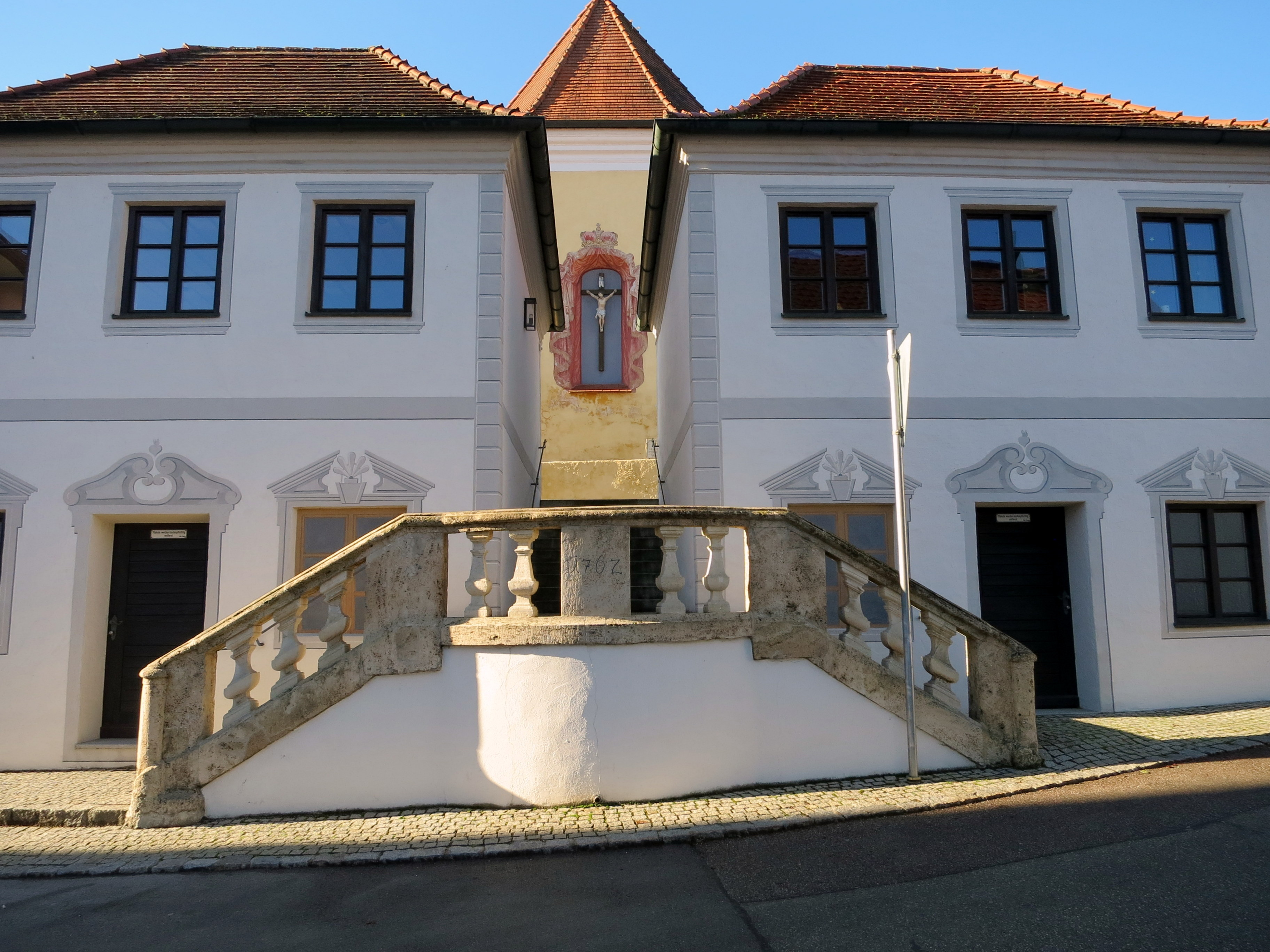 Ein barocker Friedhofsaufgang